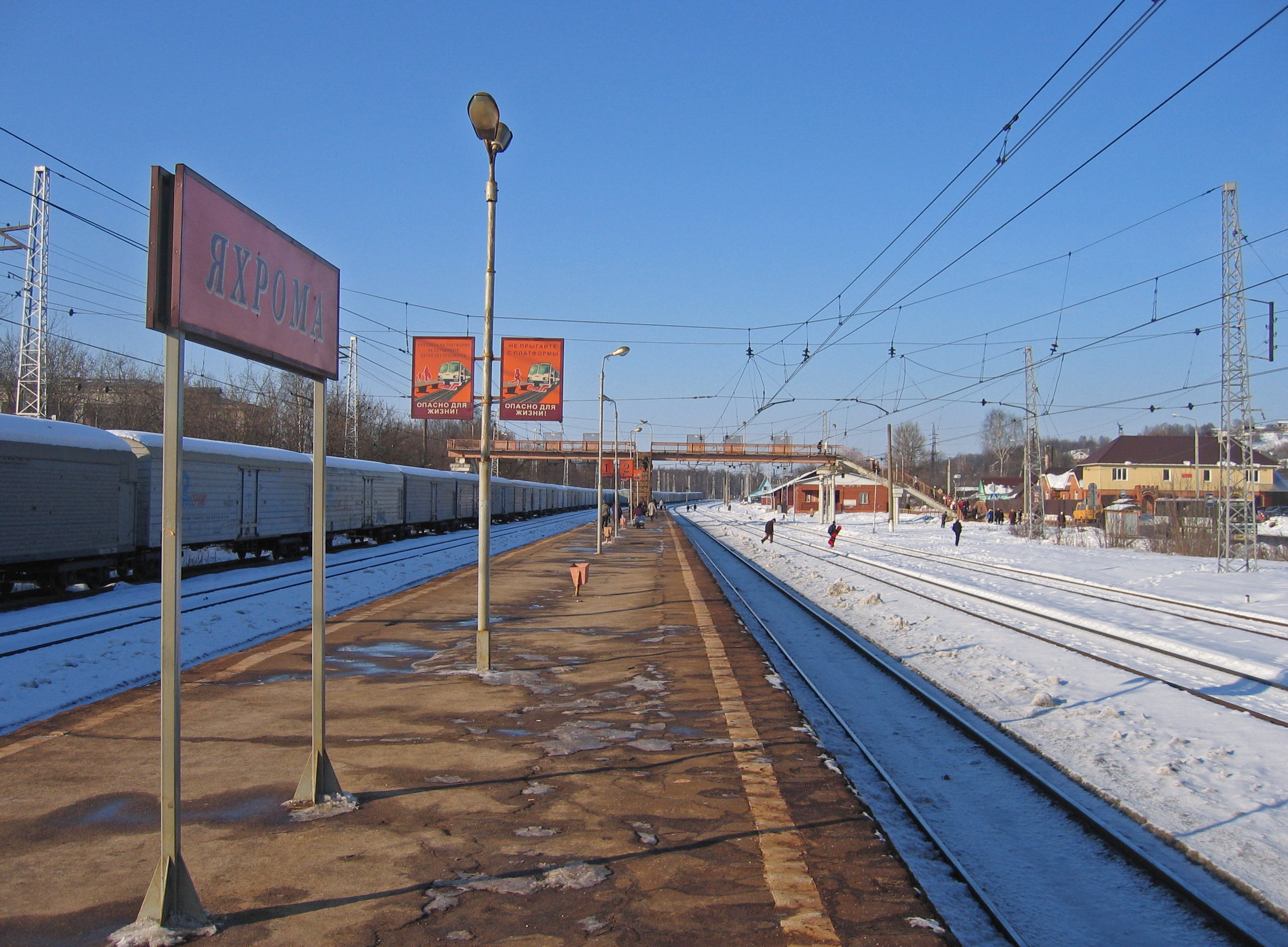 Железнодорожная станция Яхрома в Московской области